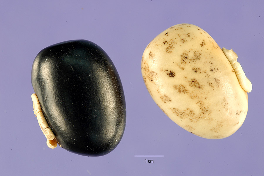 Mucuna pruriens seeds